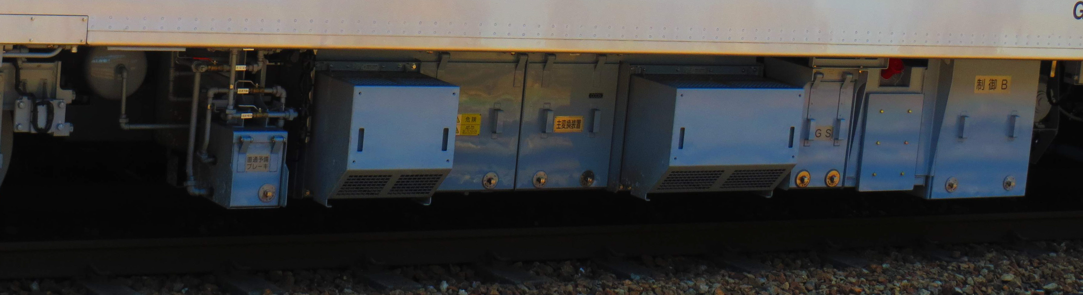 JR東日本GV-E400系気動車 C127主変換装置